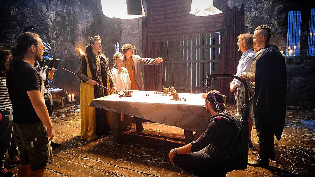 Cyber Marian, Rafał Masny i Robert Pasut na planie spotu firmy Orange "Historie na kartę"